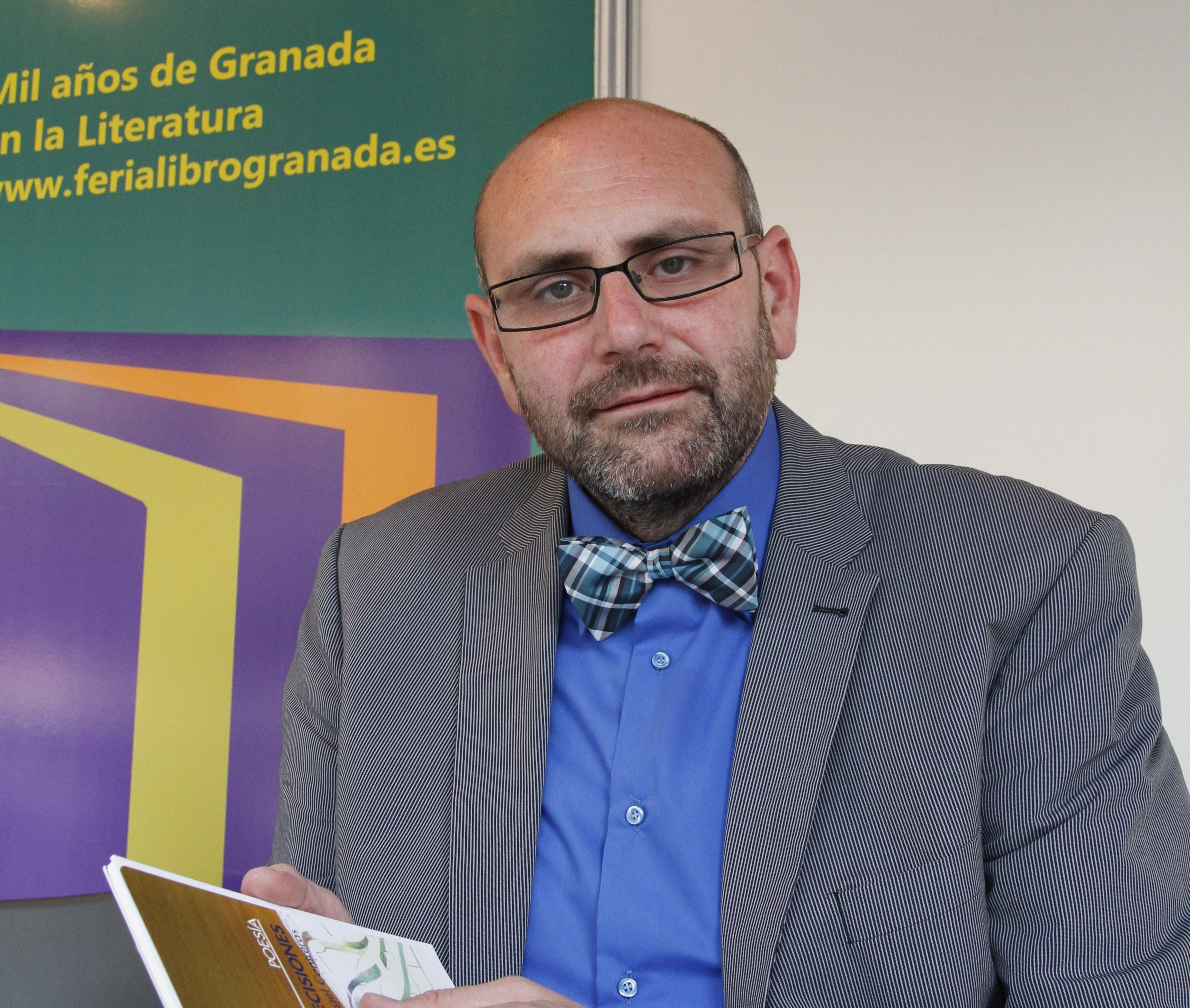 El poeta Miguel Ángel Contreras, en la Feria del Libro de Granada 2013